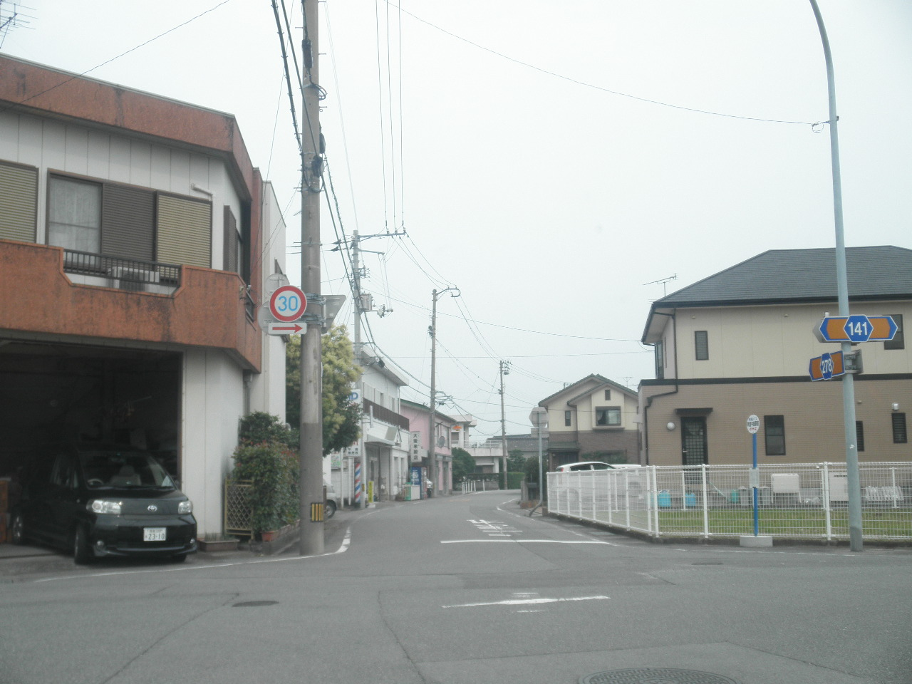 徳島県阿南市那賀川町中島 徳島県道278号蛭子原西の久保線